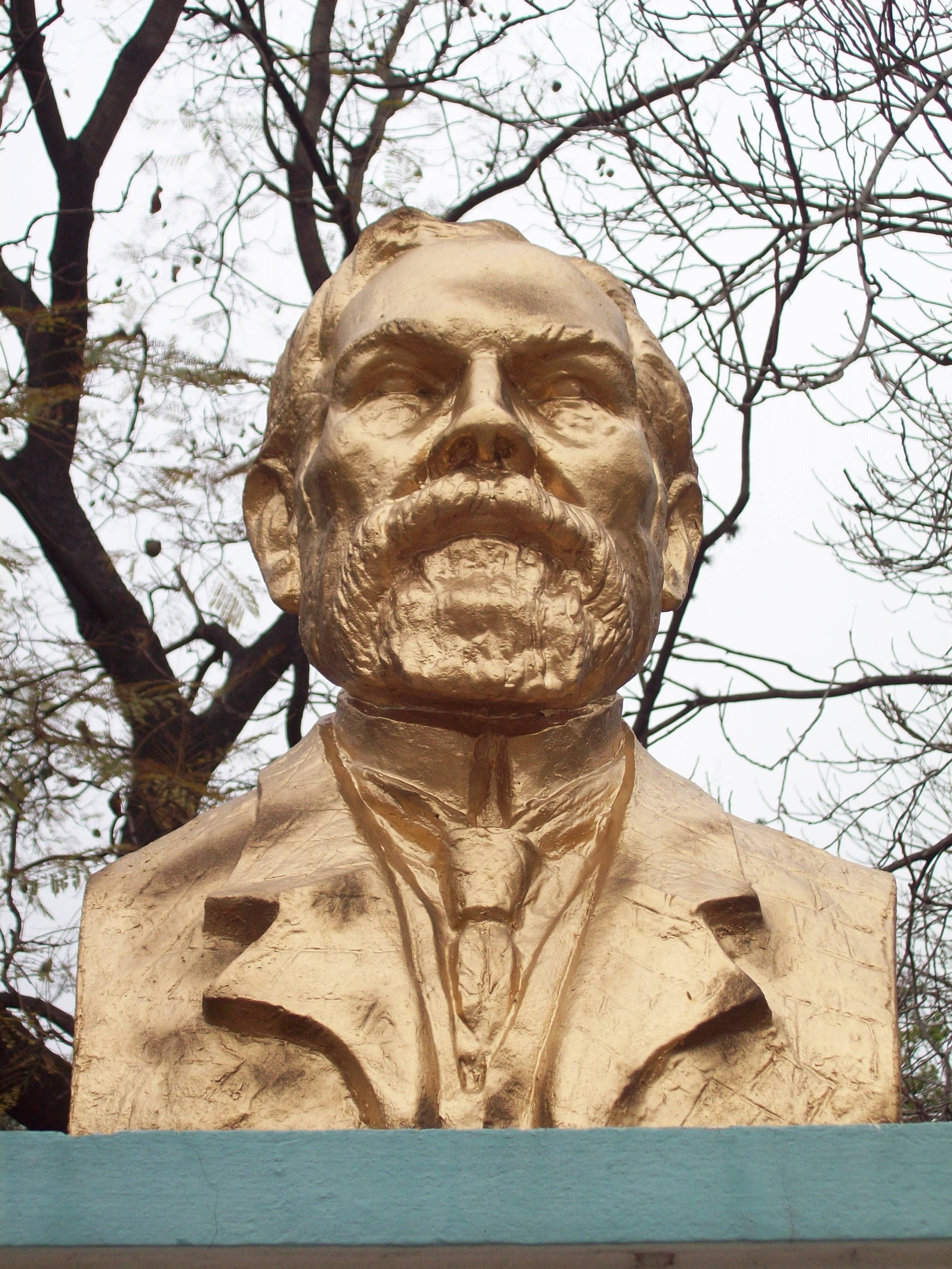 Busto emplazado en Avenida San Martín de Guillermo Hudson, Argentina.